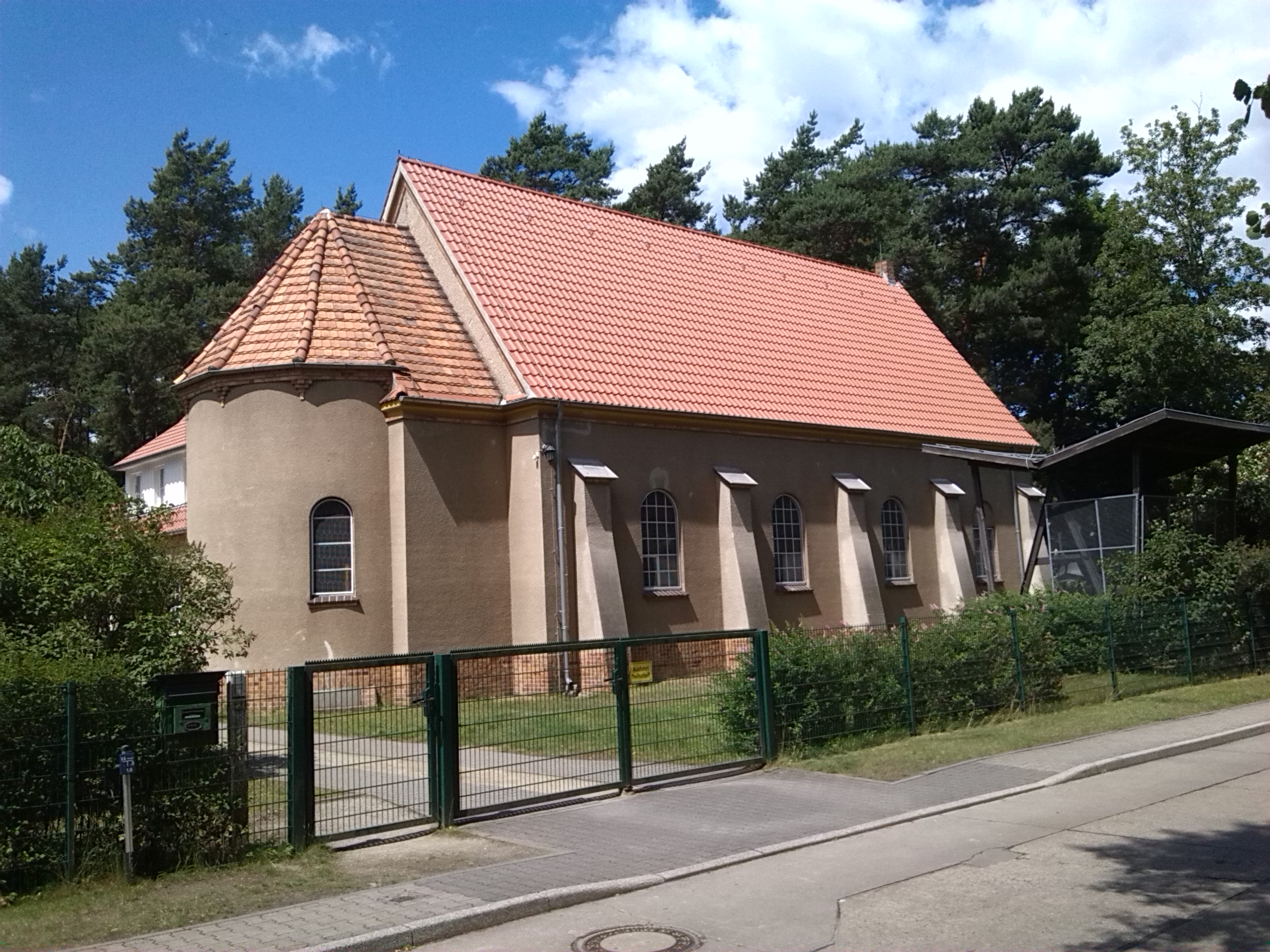 Dorfkirche Borgsdorf, 15.06.2014